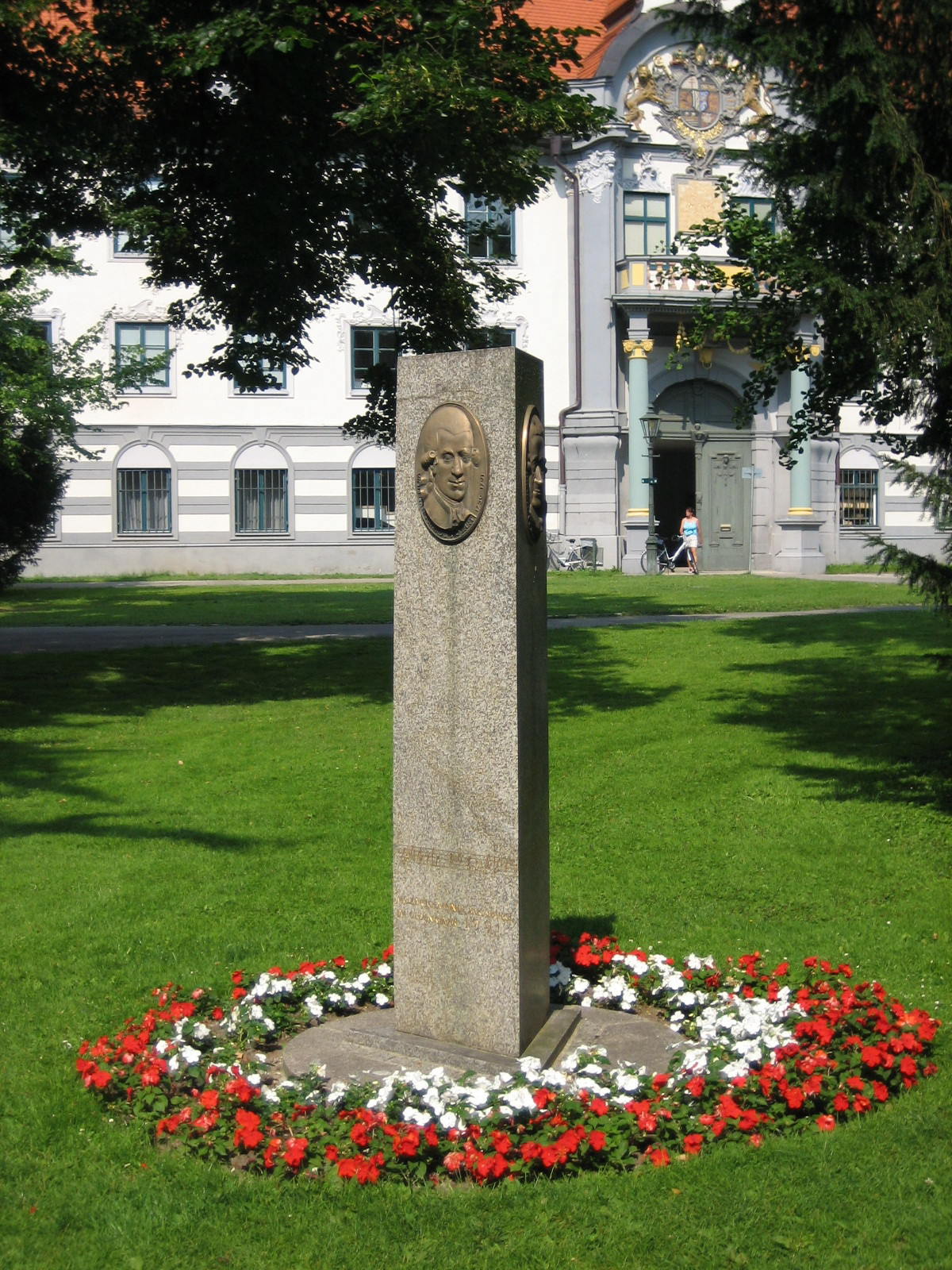 Mozartstelle in Augsburg am Fronhof, errichtet aus Anlaß des Mozartjahres 1991, erinnert am Wolfgang Amadeus und seinen Vater Leopold Mozart